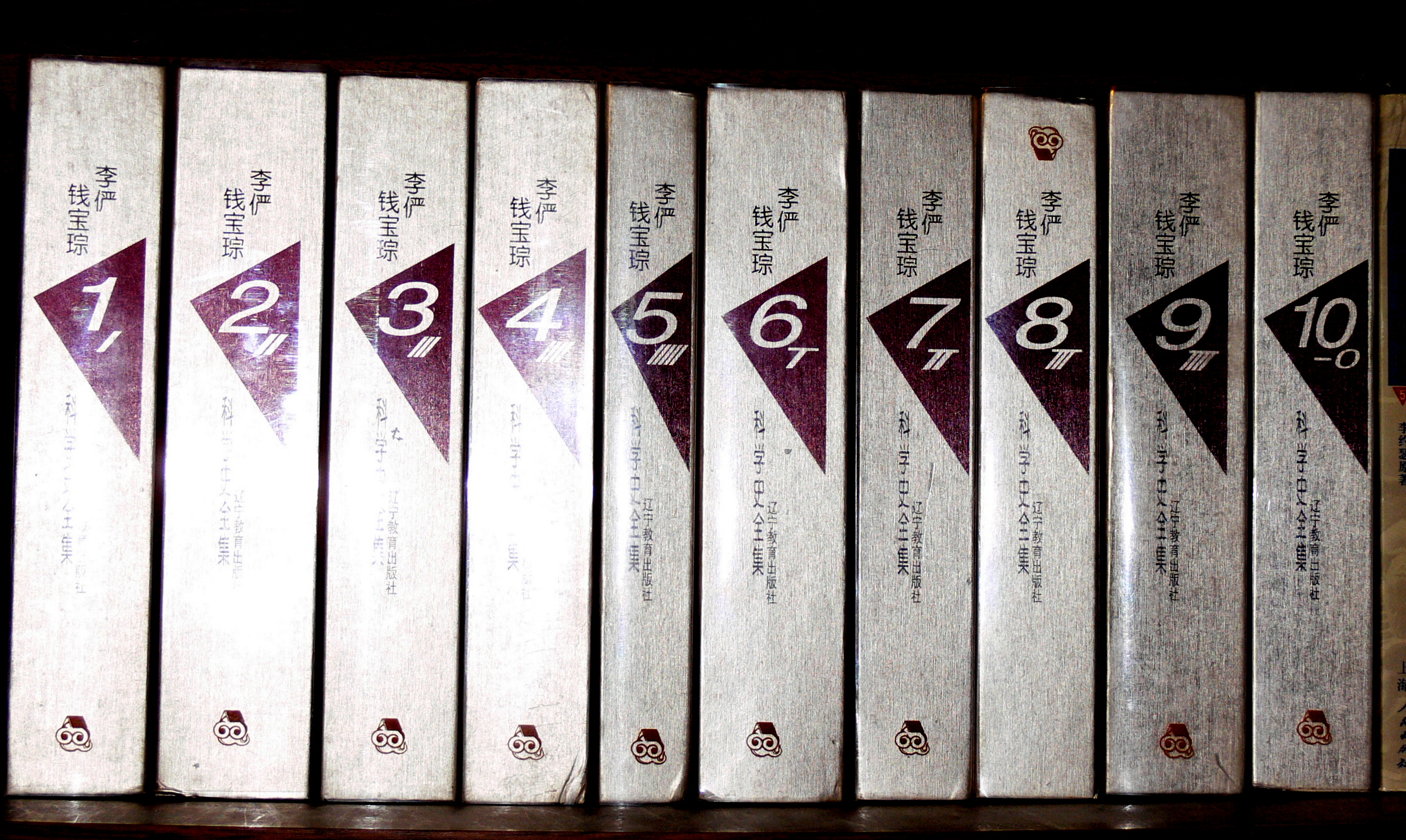 中文（中国大陆）: 李俨钱宝琮科学史全集1-10 卷